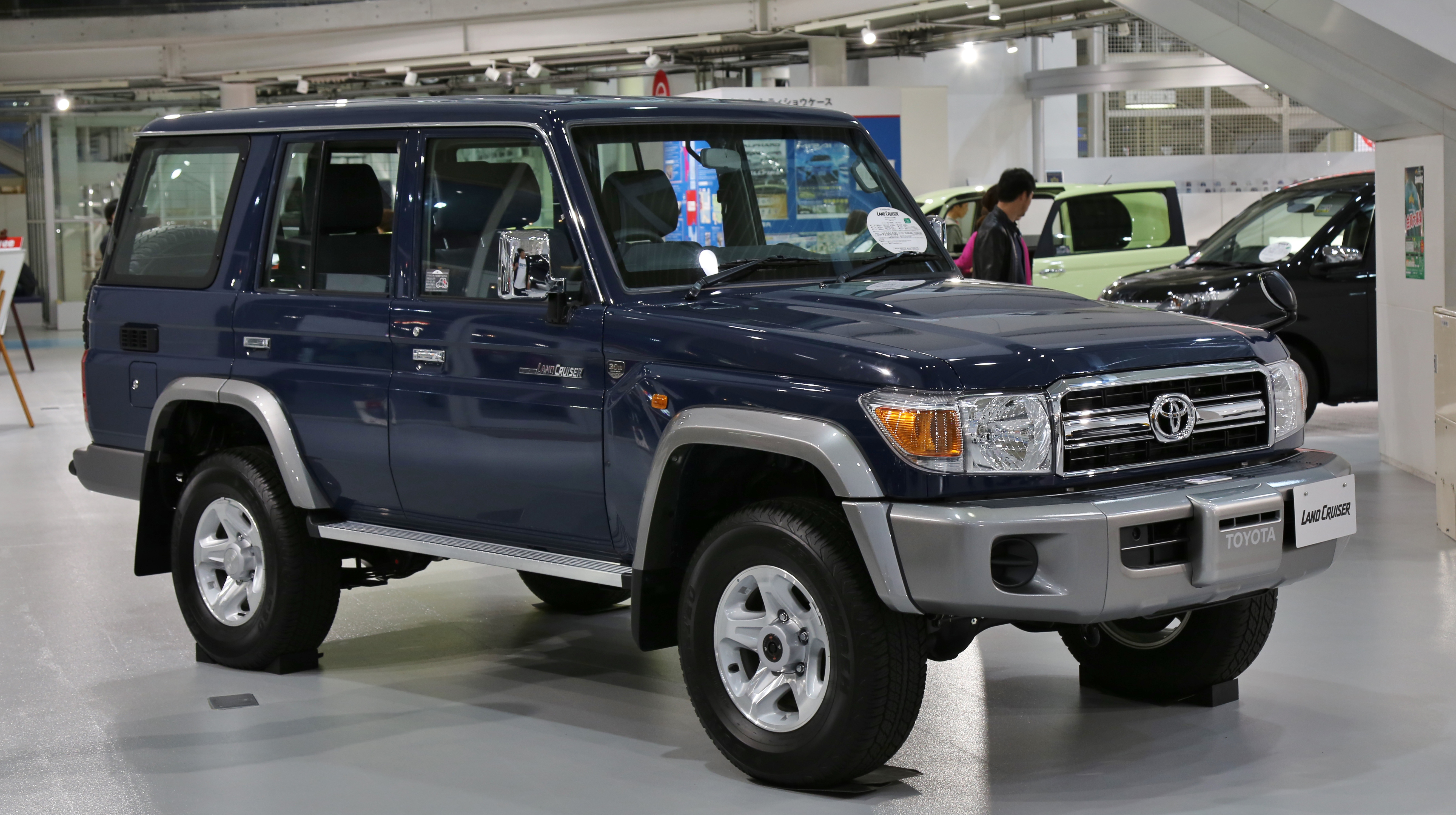 Toyota Land Cruiser 70